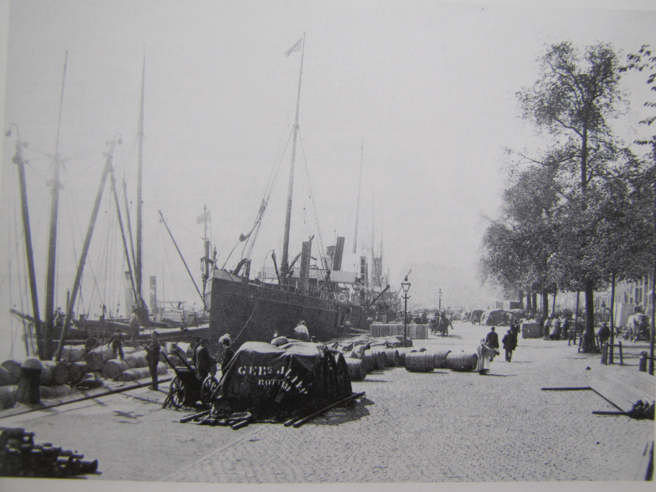 Rotterdam les quais Boompjes et l'avenue Boompjeskade. Photographie de C.E.Mögle, 1899 (archives municipales).